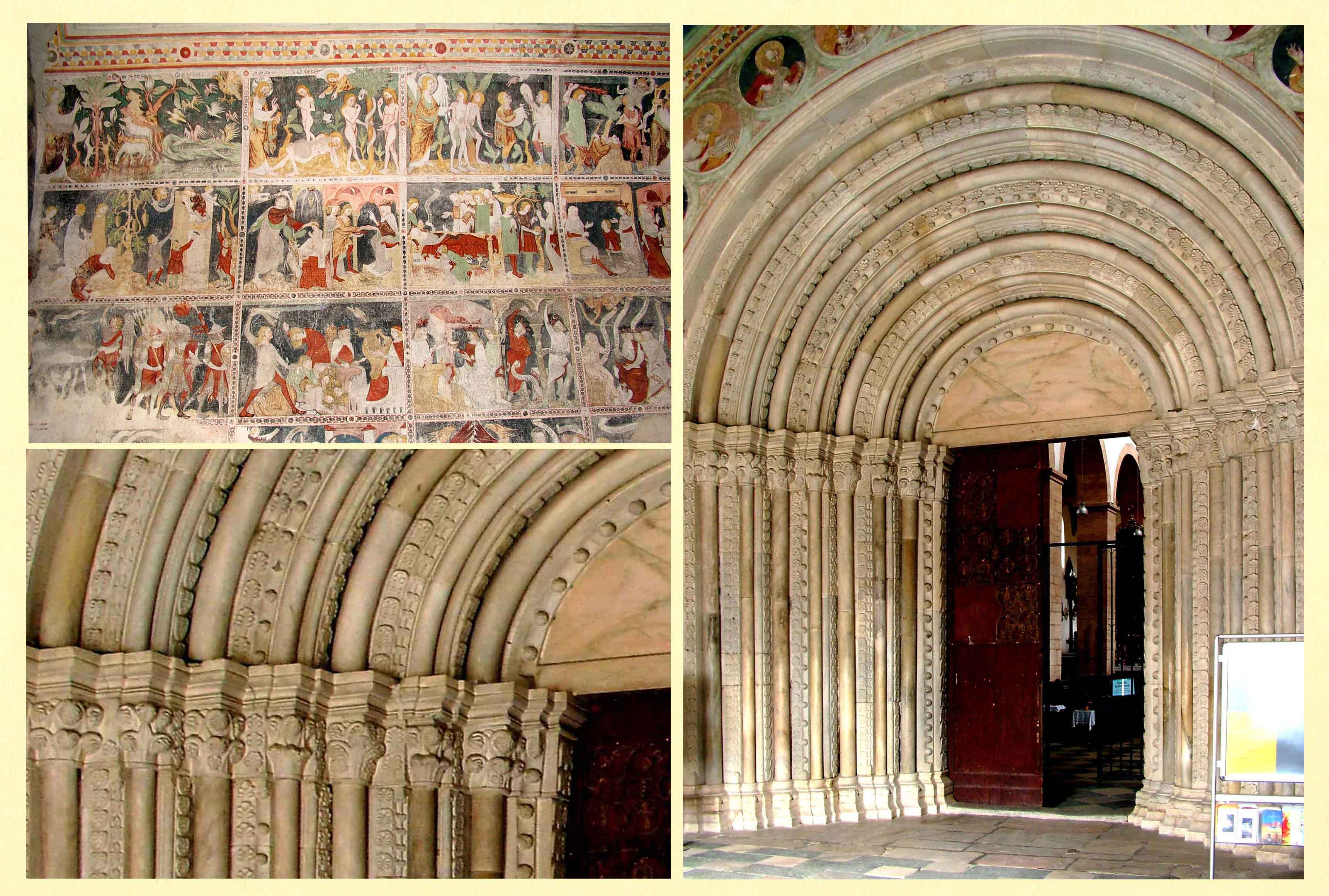 Gurki székesegyház (Ausztria): a nyugati kaputér részletei (bélletes főkapu, bélletrészetek, falfestmény az északi falról